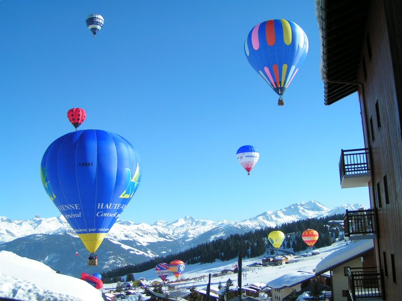 Rassemblement des Saisies, Image personnelle